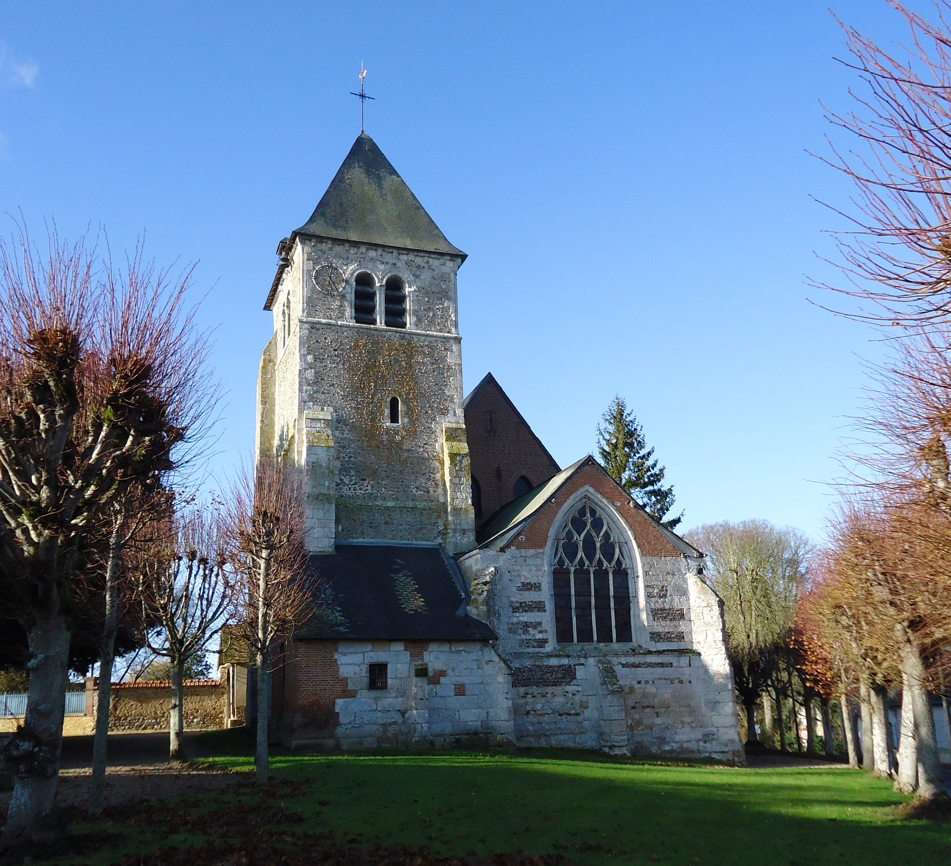 Ailly - Eglise Saint-Médard XIIe, XVIe & XVIIe (Part. ISMH) Vue est.